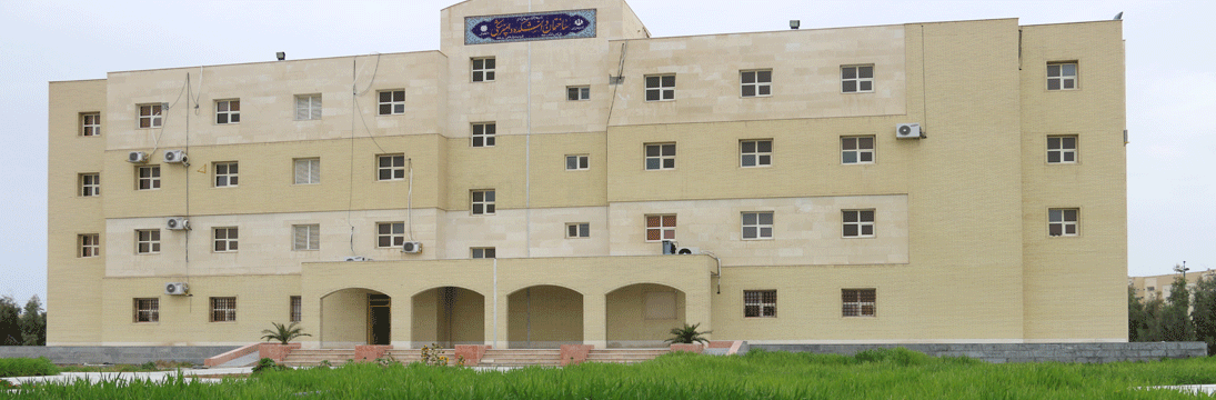 نمای دانشکده دامپزشکی